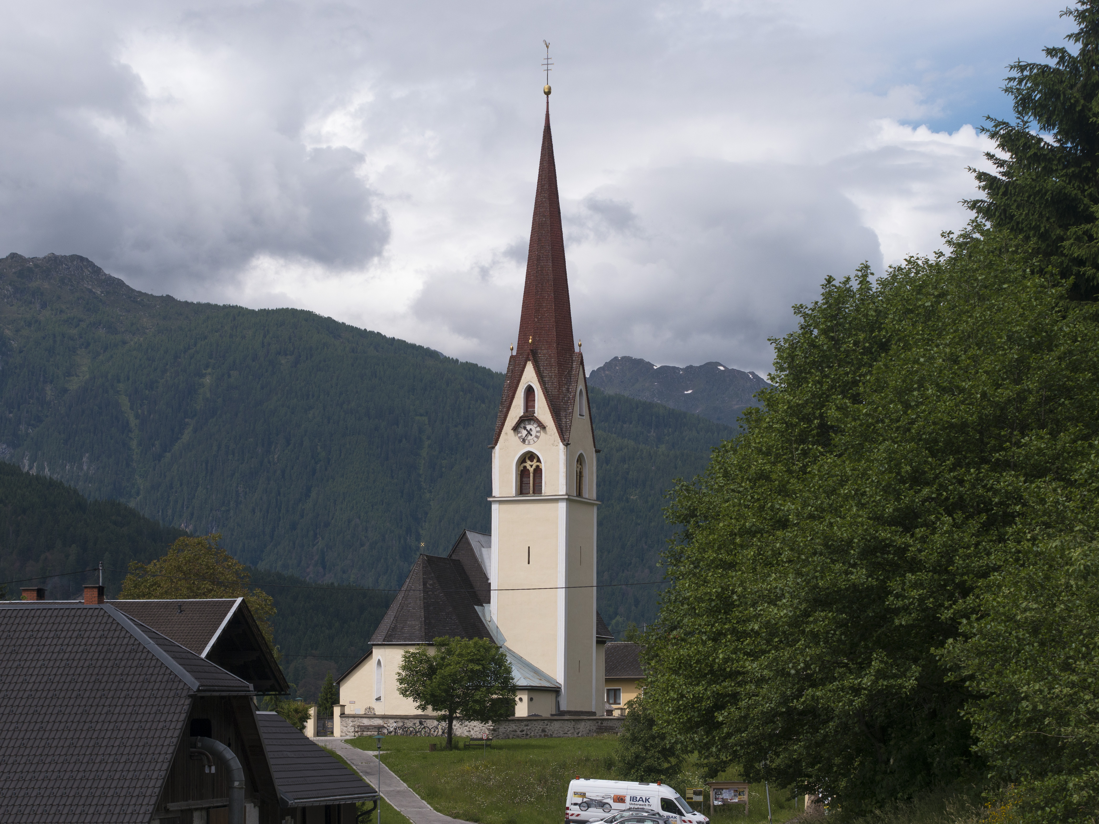 Kath. Pfarrkirche hl. Jakob und Friedhof